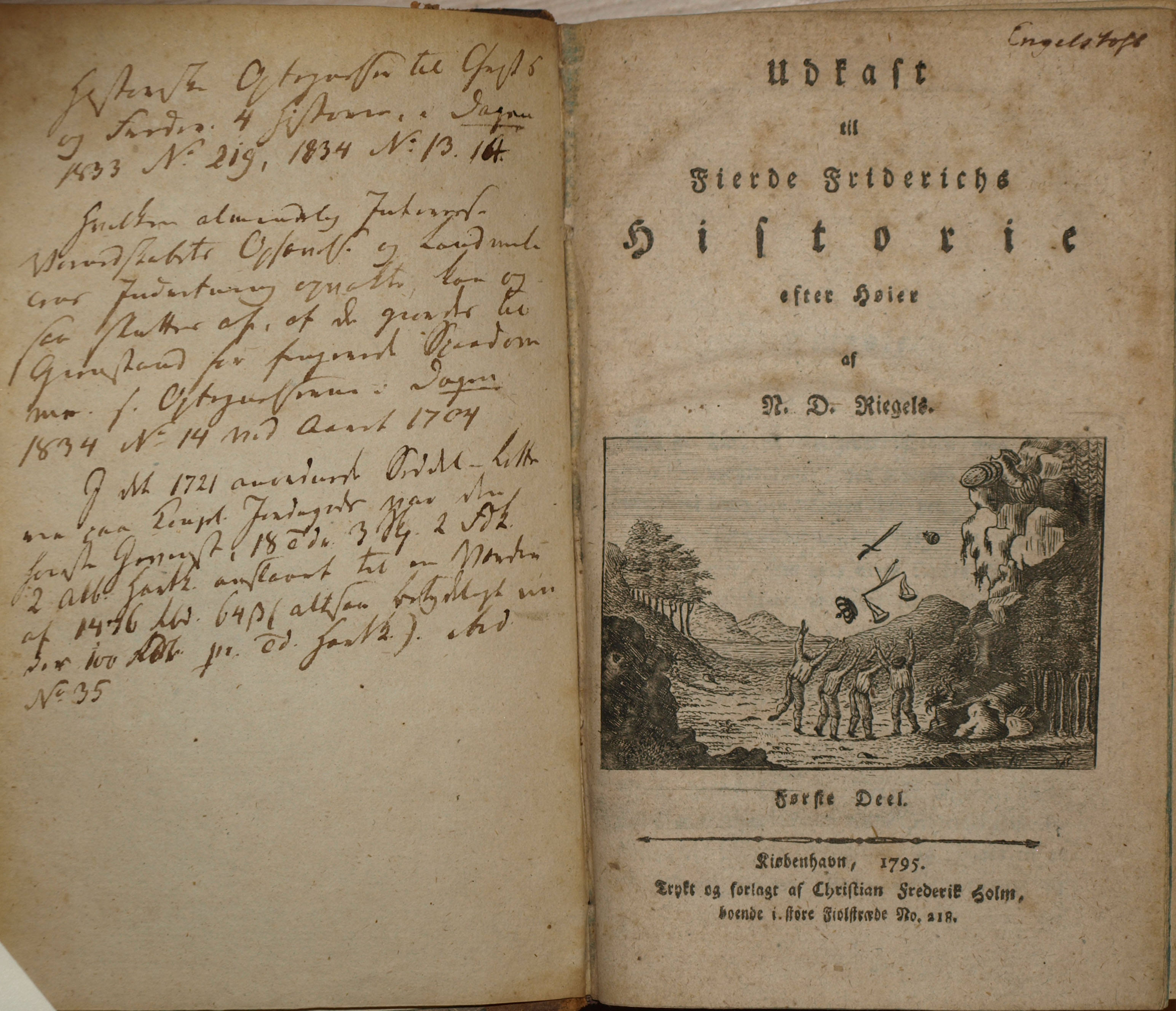 Titelbladet til Niels Ditlev Riegels Udkast til Fierde Friderichs Historie - Første Deel fra 1795. Historikeren Laurids Engelstofts signatur i øverste højre hjørne og hans egenhændige noter på forsatsbladet.